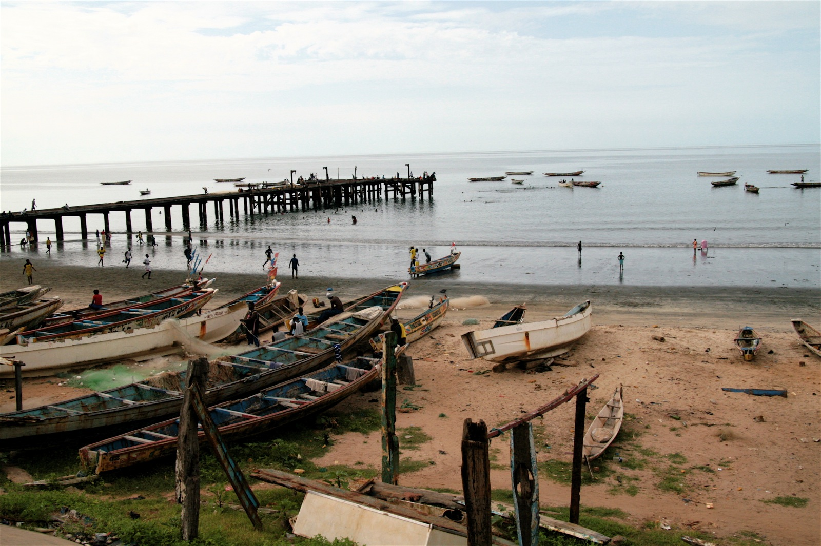 Pirogues à Bakau (Gambie)